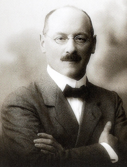 (Porträt ca. 1821) Gustav von Burg (1871–1927) war ein Schweizer Lehrer, Ornithologe, Publizist und Autor. Seine Forschungen waren wegweisend für die Ornithologie, Kleinsäuger- und Jagdkunde.